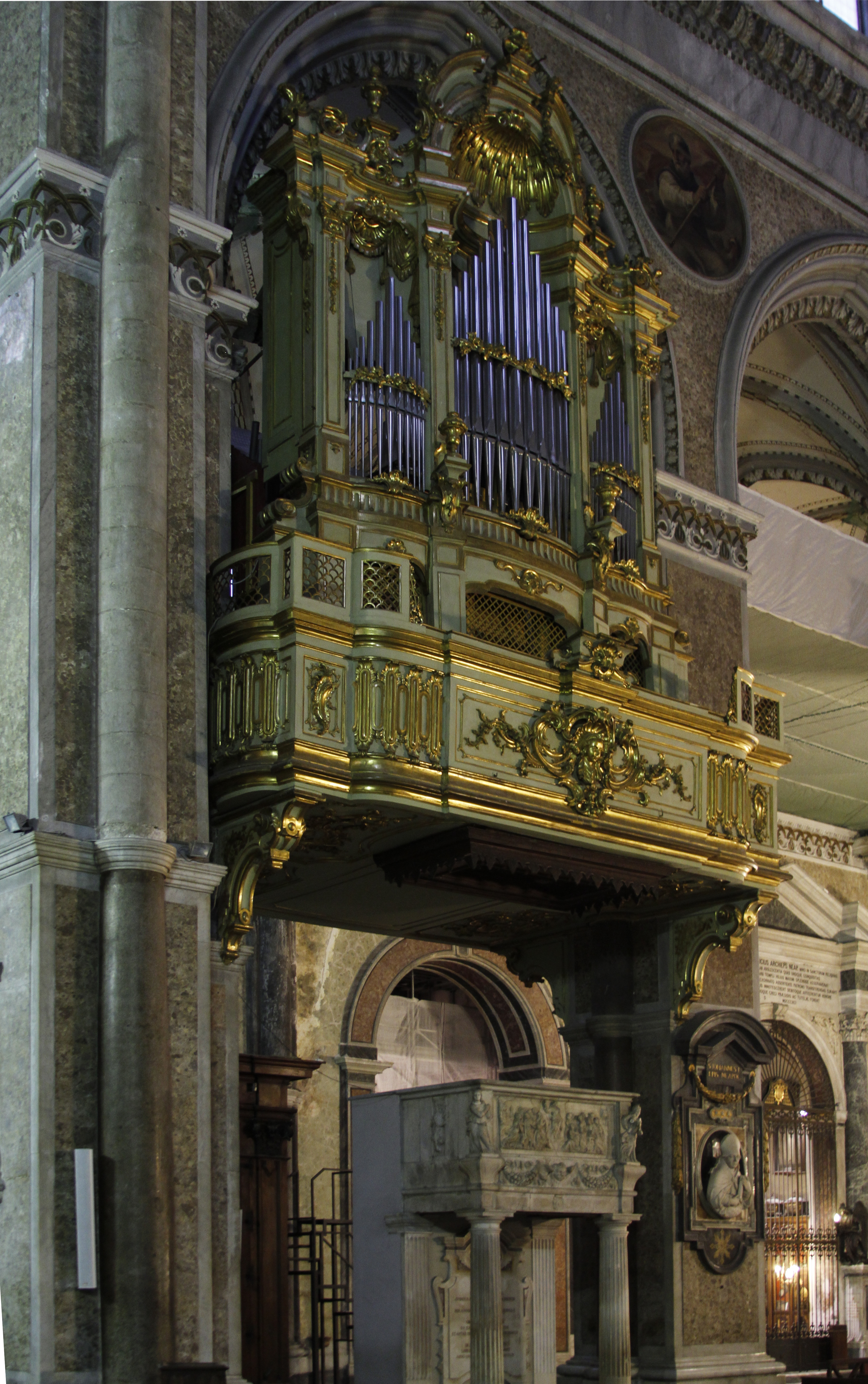 Orgão da Catedral de Nápoles